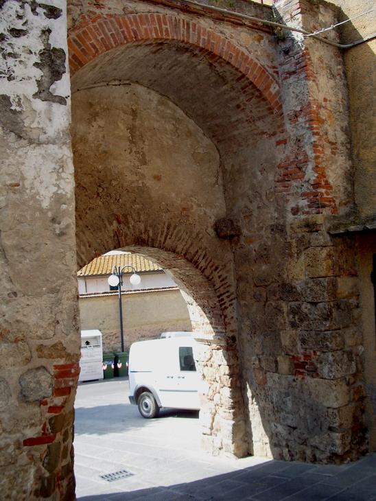 Veduta dall'interno di Porta Grossetana a Batignano (GR)